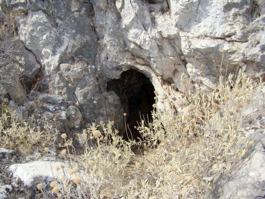 Το σπήλαιο του Μπότη